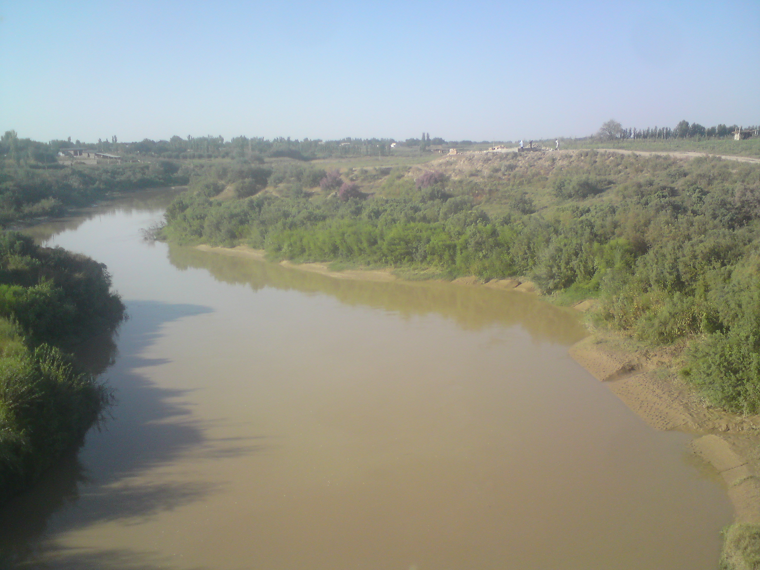 Канал Бозсу (Нижний Бозсу) у посёлка Янгиабад и узбекско-казахской границы, Чиназский район, Ташкентский вилоят